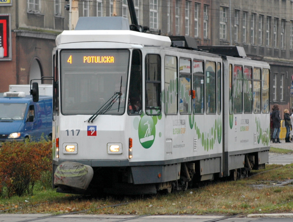 Tatra KT4D na Placu Rodła w Szczecinie.